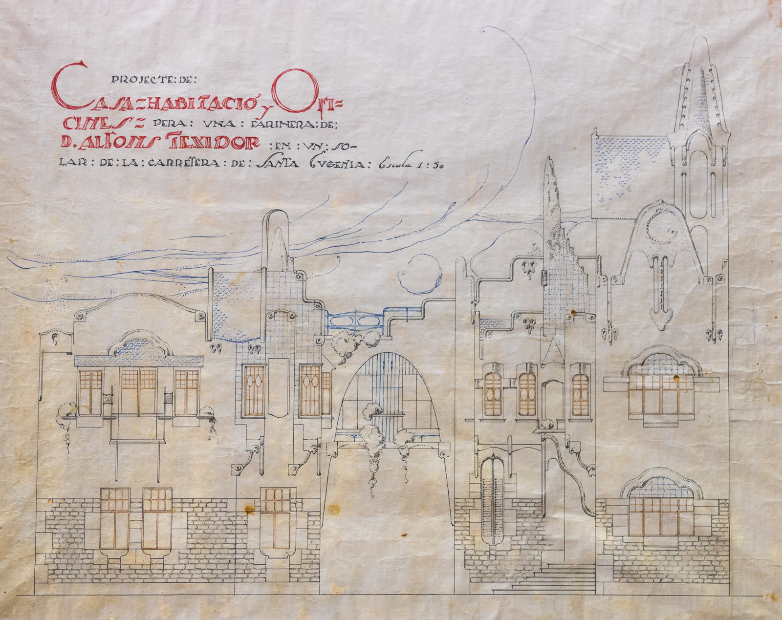 Plano de la Farinera Teixidor dibujado por el arquitecto Rafael Masó